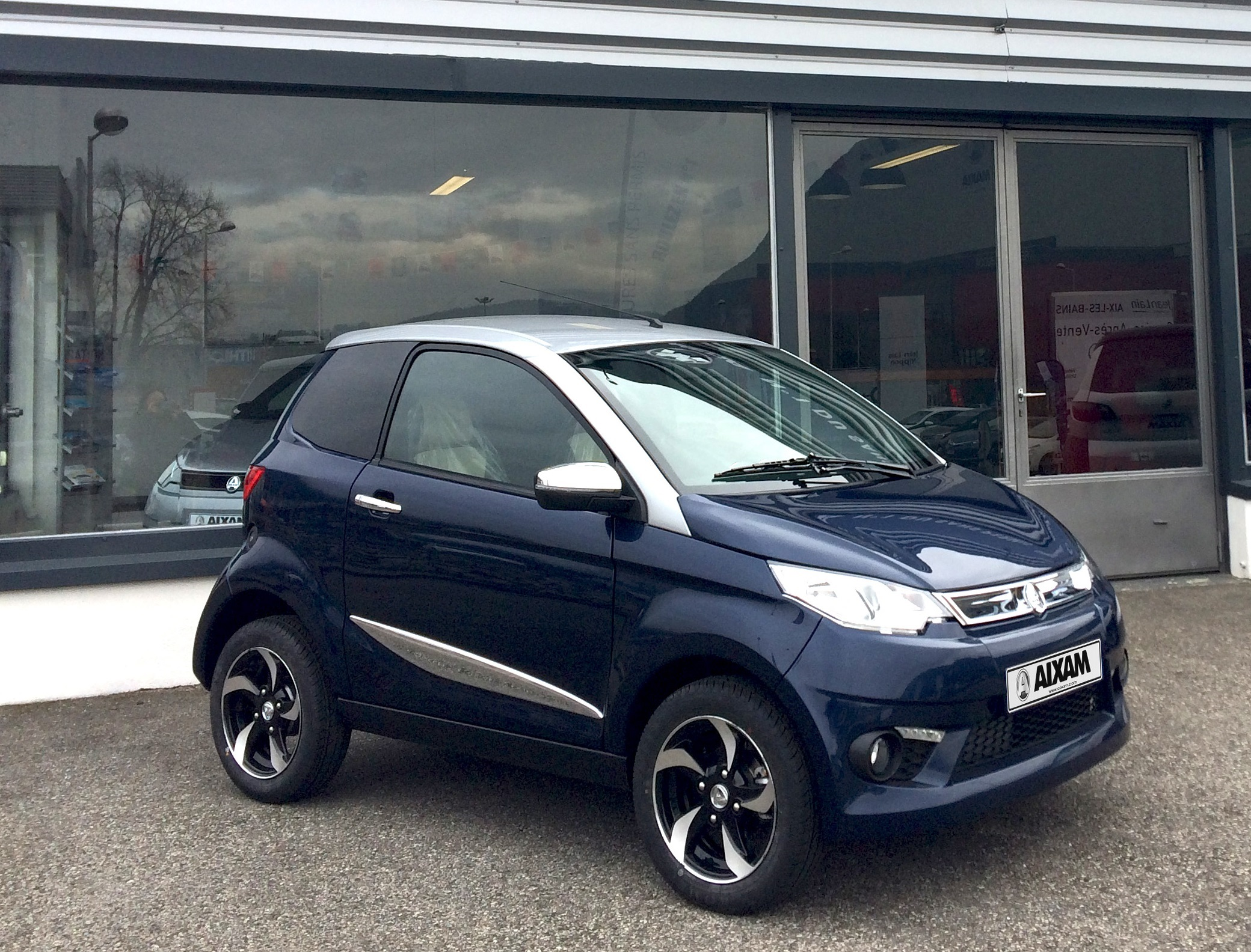 City Premium Aixam gamme Sensation